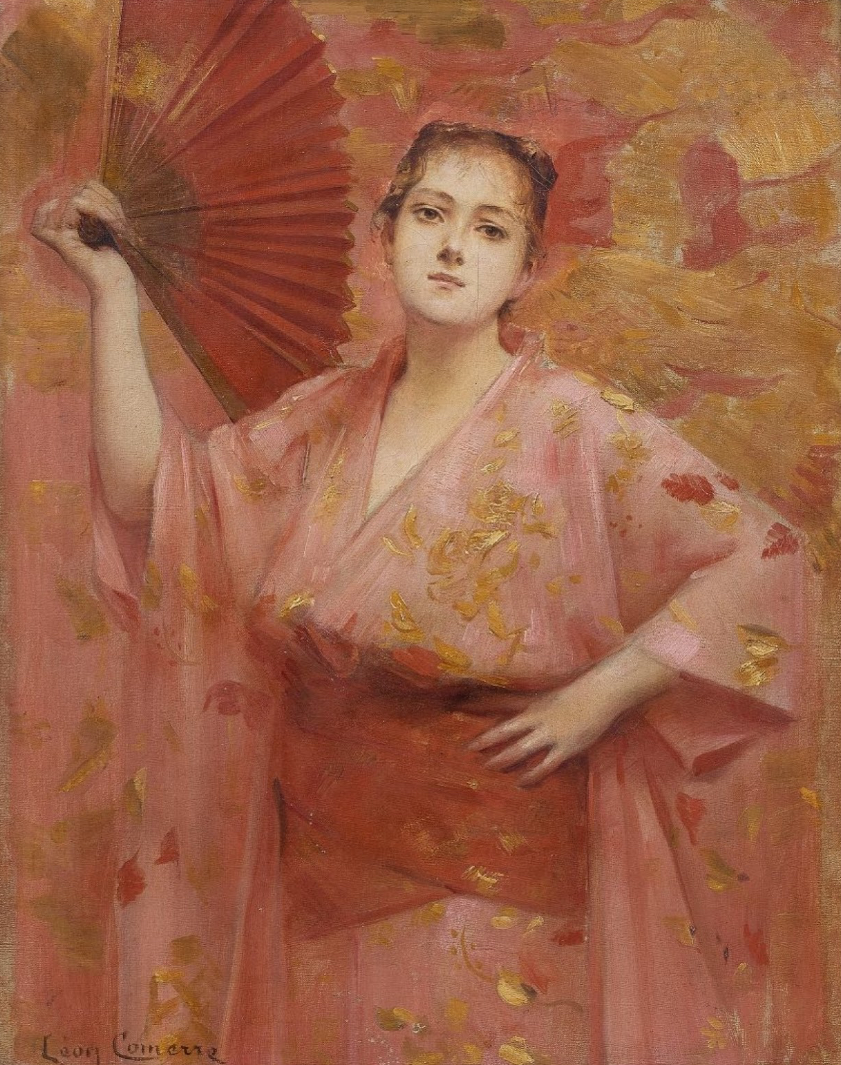 Georges Achille-Fould (1865-1951) en japonaise